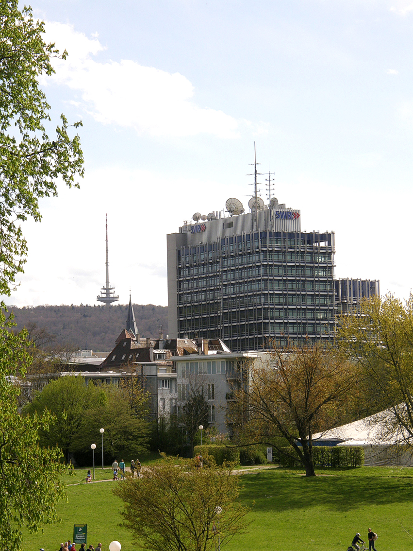 Untere Schlossgarten in Stuttgart